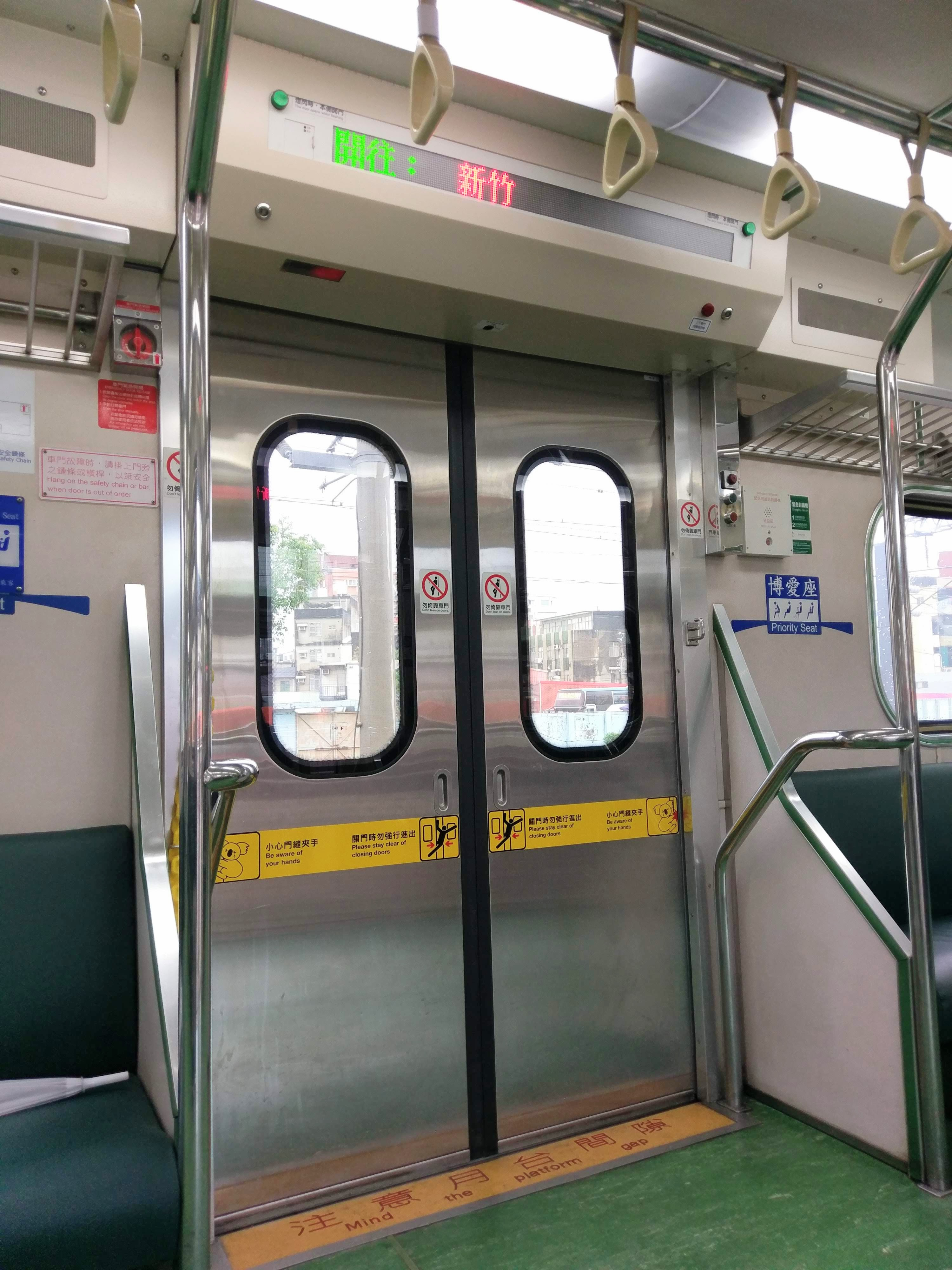 中文（台灣）: 台鐵EMU500型電聯車EMC車廂的車門內側